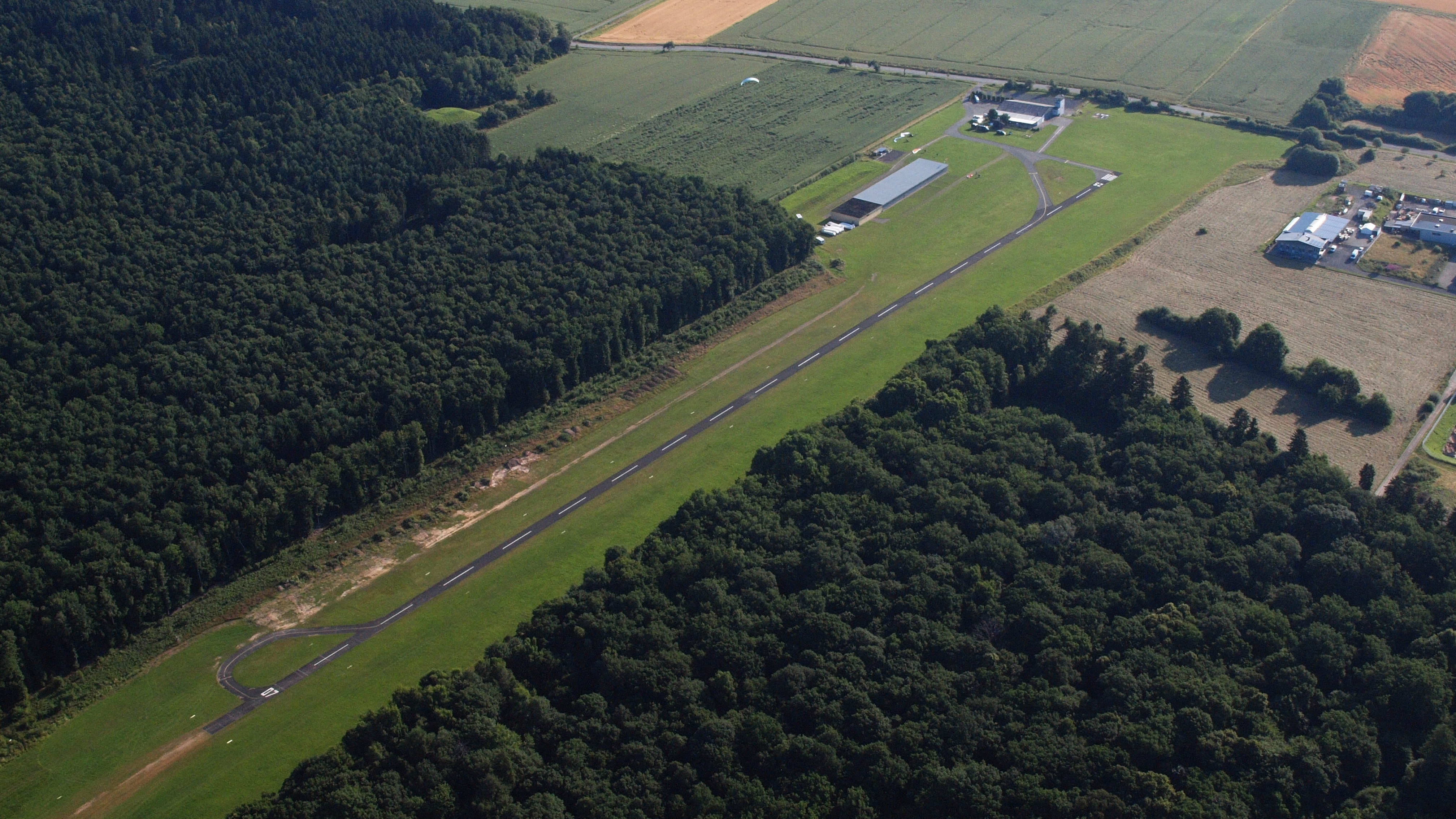 Flugplatz Elz: Luftaufnahme ICAO-Code = EDFY